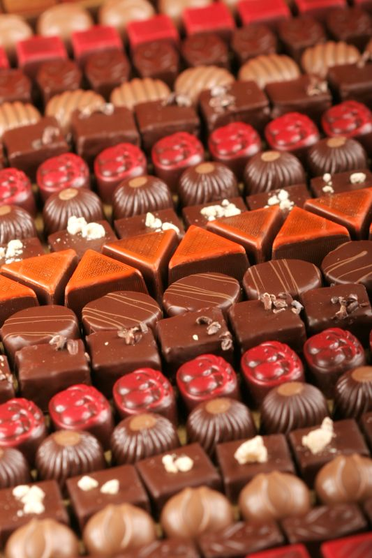 Pralines